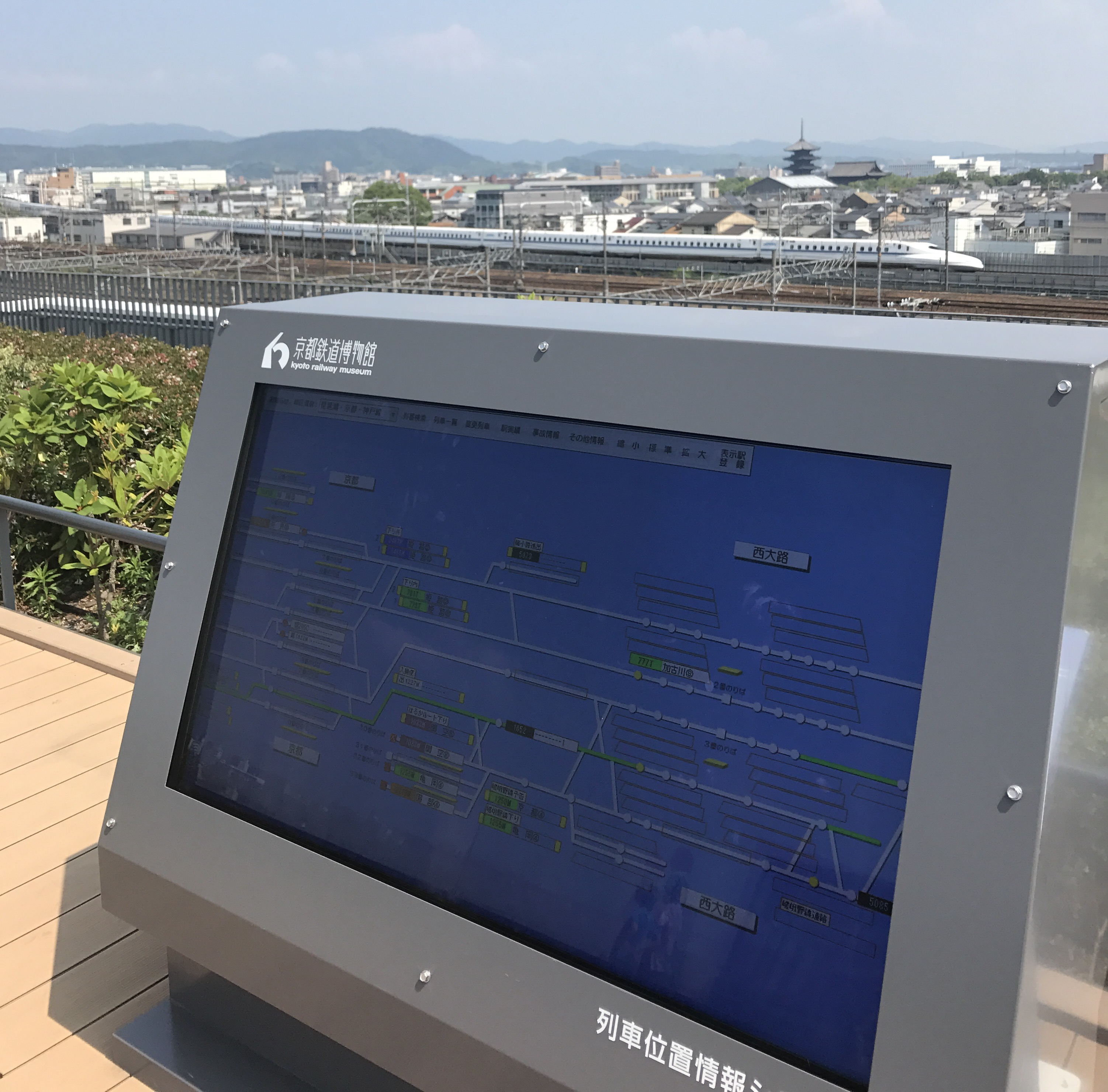 京都鉄道博物館のスカイテラスに設置された列車位置情報システム。